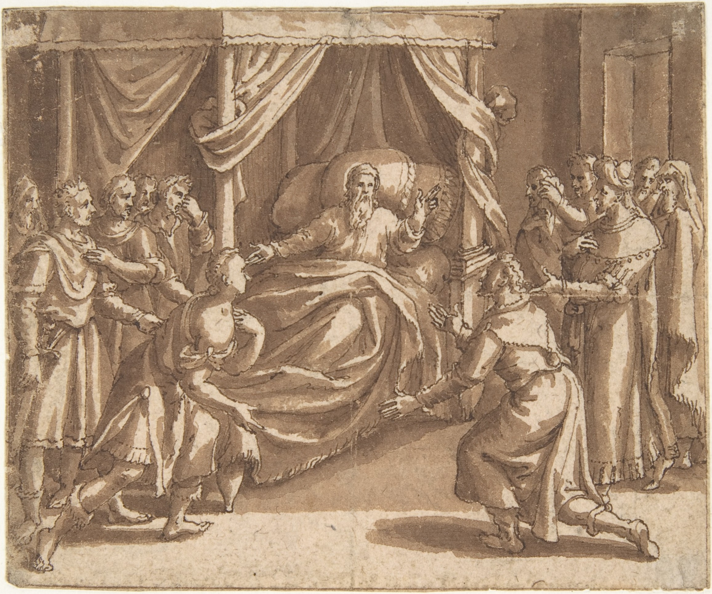 Drawing; Drawings